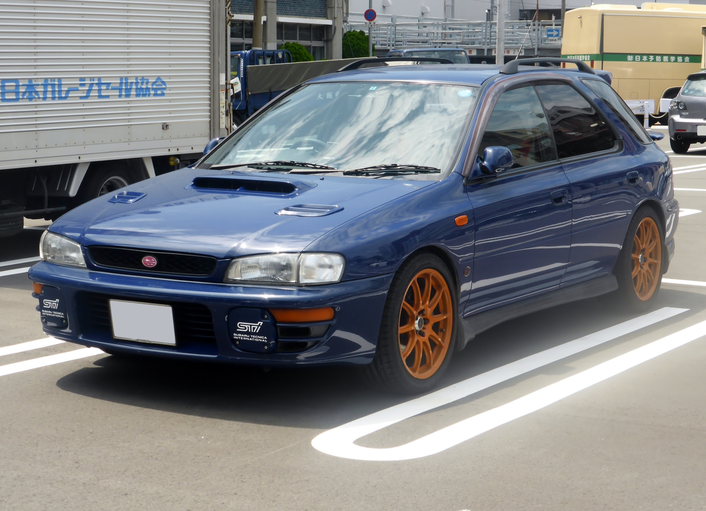 チューニングされたGF8型スバル・インプレッサスポーツワゴンWRX STiをフロントから撮影。